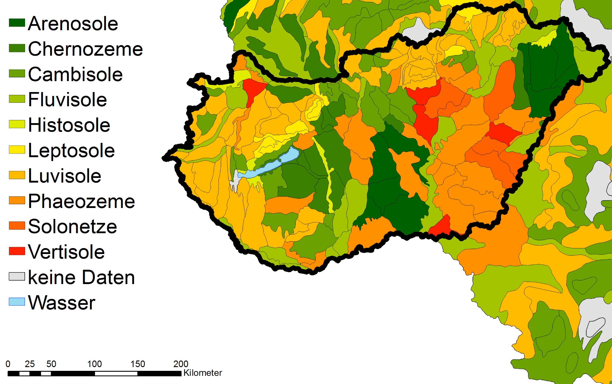 Karte der Bodentypen auf ungarischer Staatsfläche